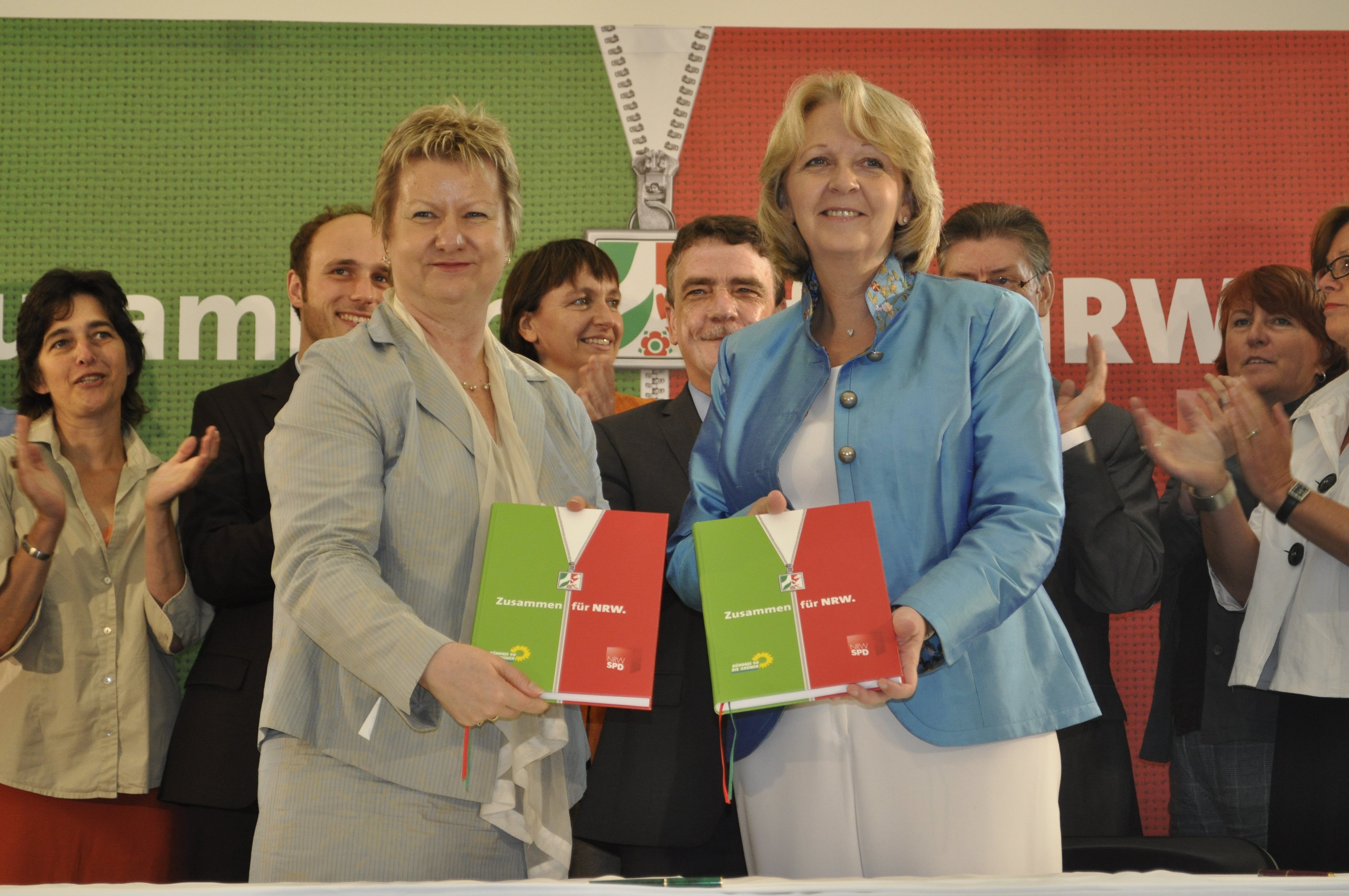 2010-07-12 Koalitionsvertrag-Unterzeichnung